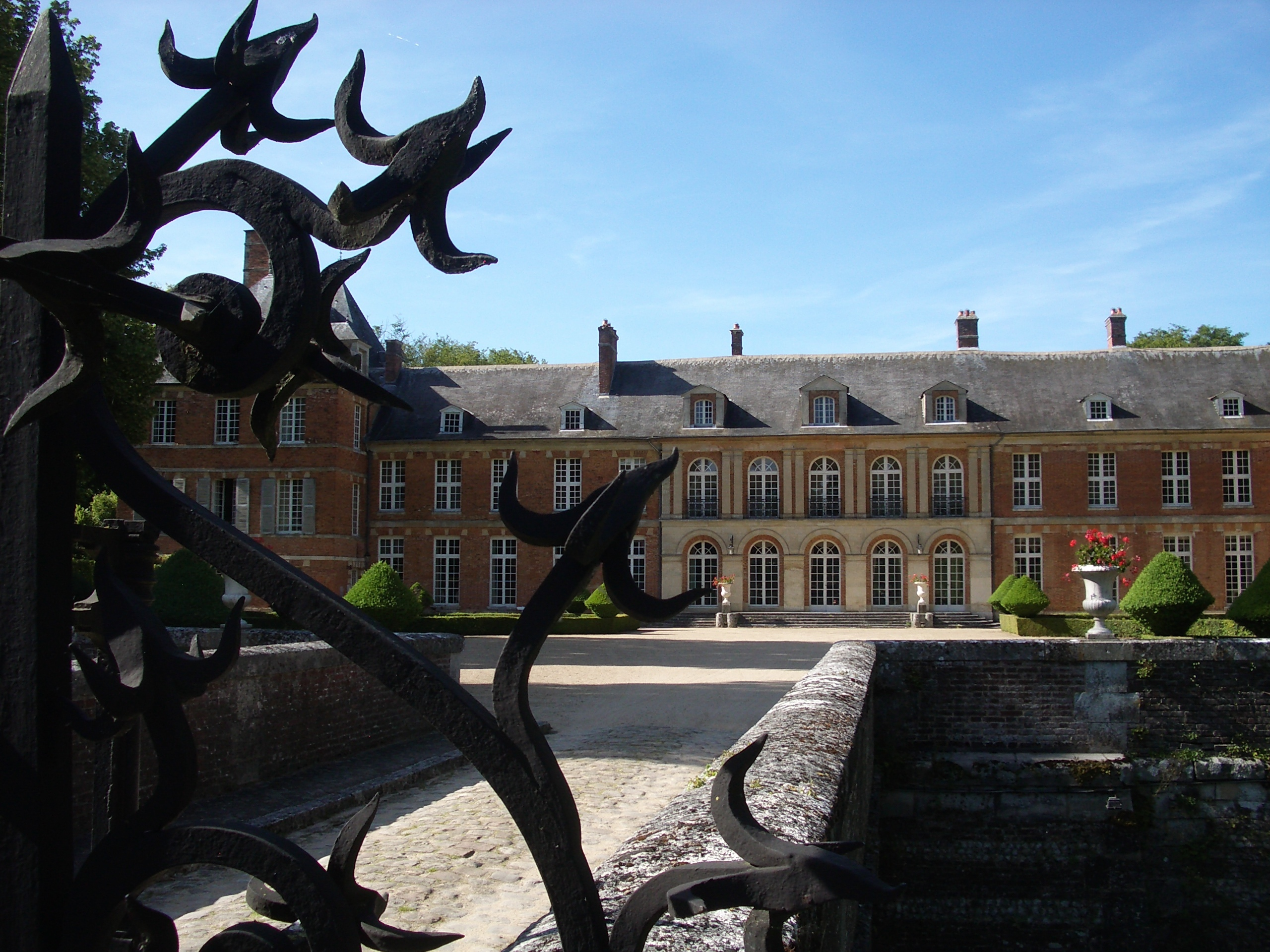 Le château d'Heudicourt (Eure) vu de la grille.